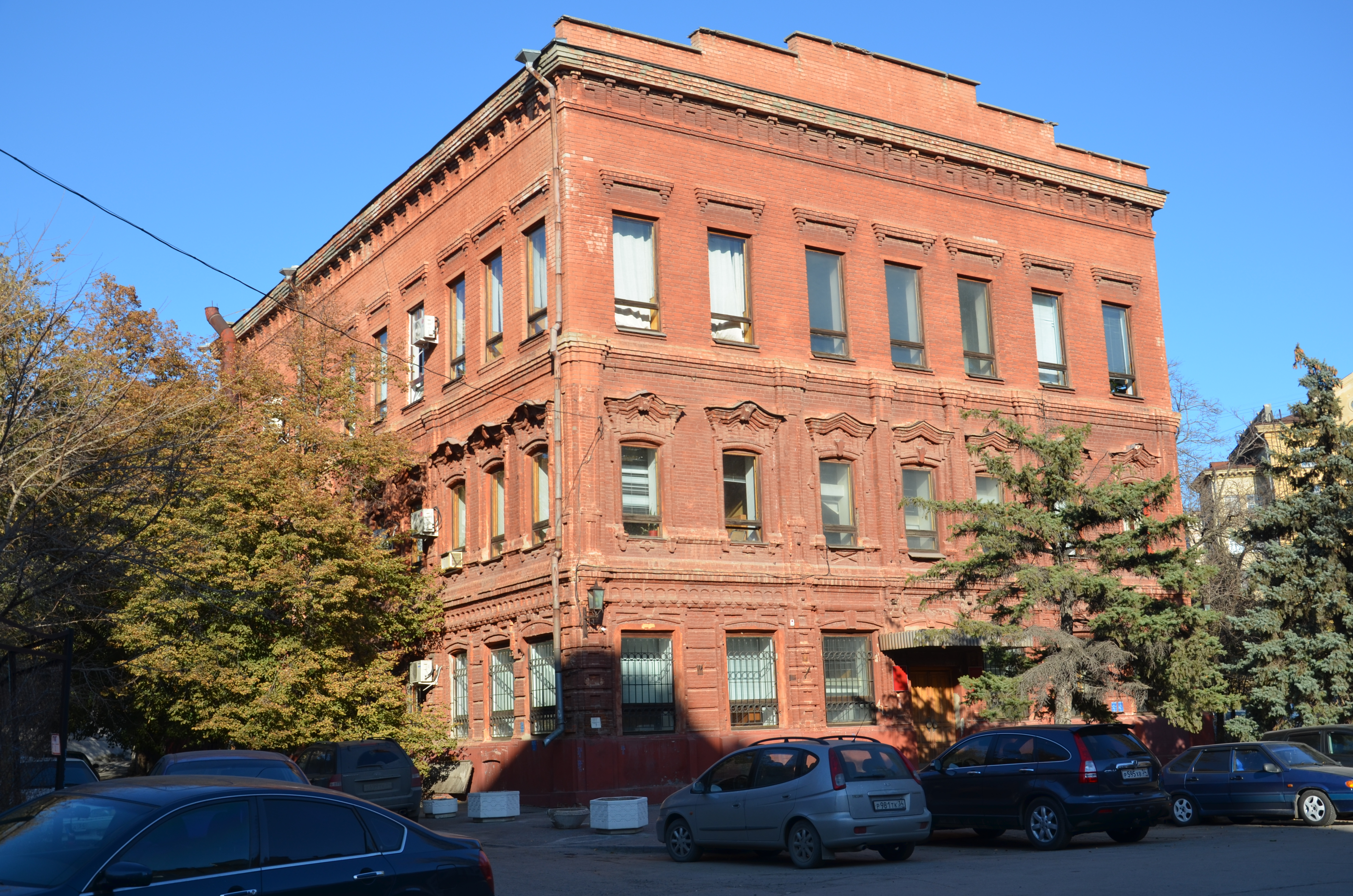 Купеческий особняк (Волгоградская область, Волгоград, Островского улица, 3)